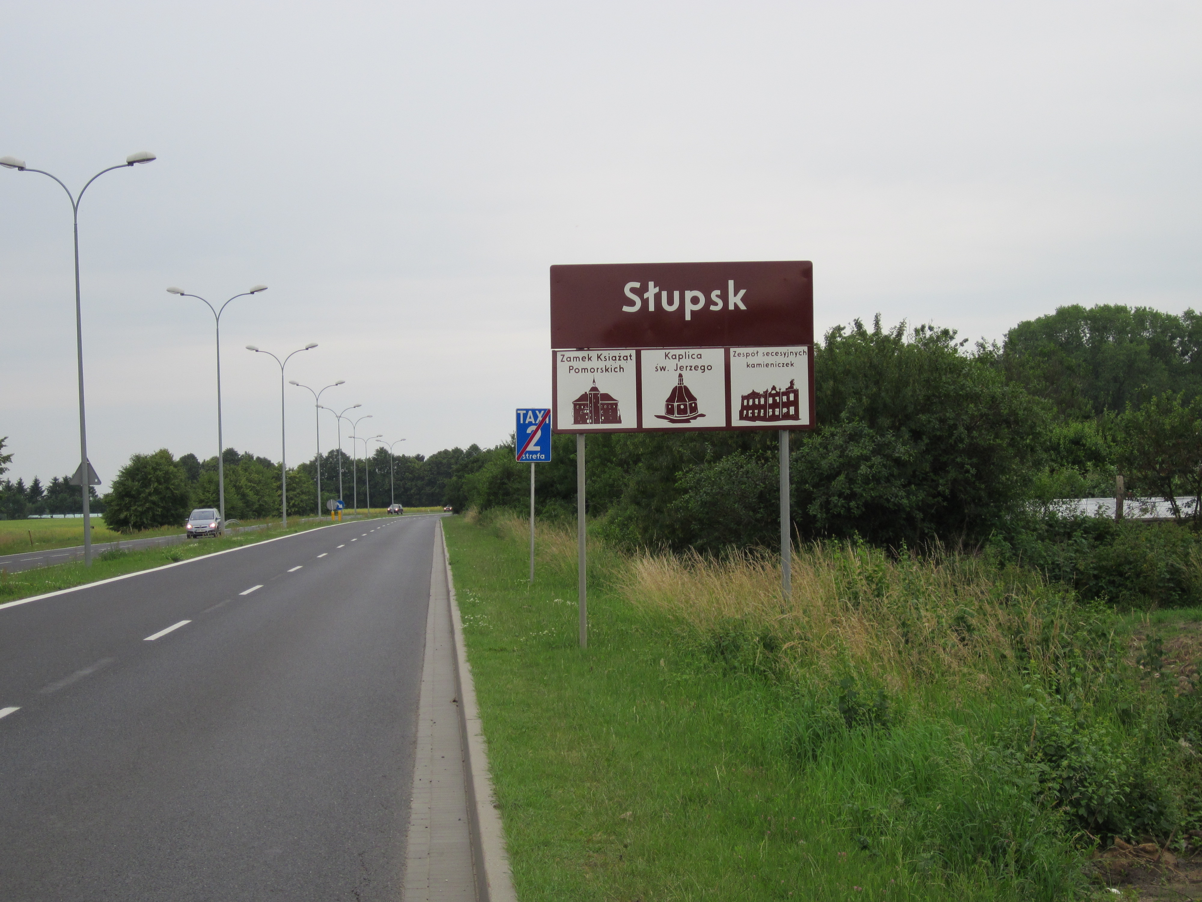 Witacz ten znajduje się przy ul. Gdańskiej od miejscowości Redzikowo. Znak ten informuje o najciekawszych atrakcjach turystycznych Słupska. Informuje o takich obiektach turystycznych jak: Zamek Książąt Pomorskich, Kaplica św. Jerzego czy o Zespole secesyjnych kapliczek, które warto zobaczyć.